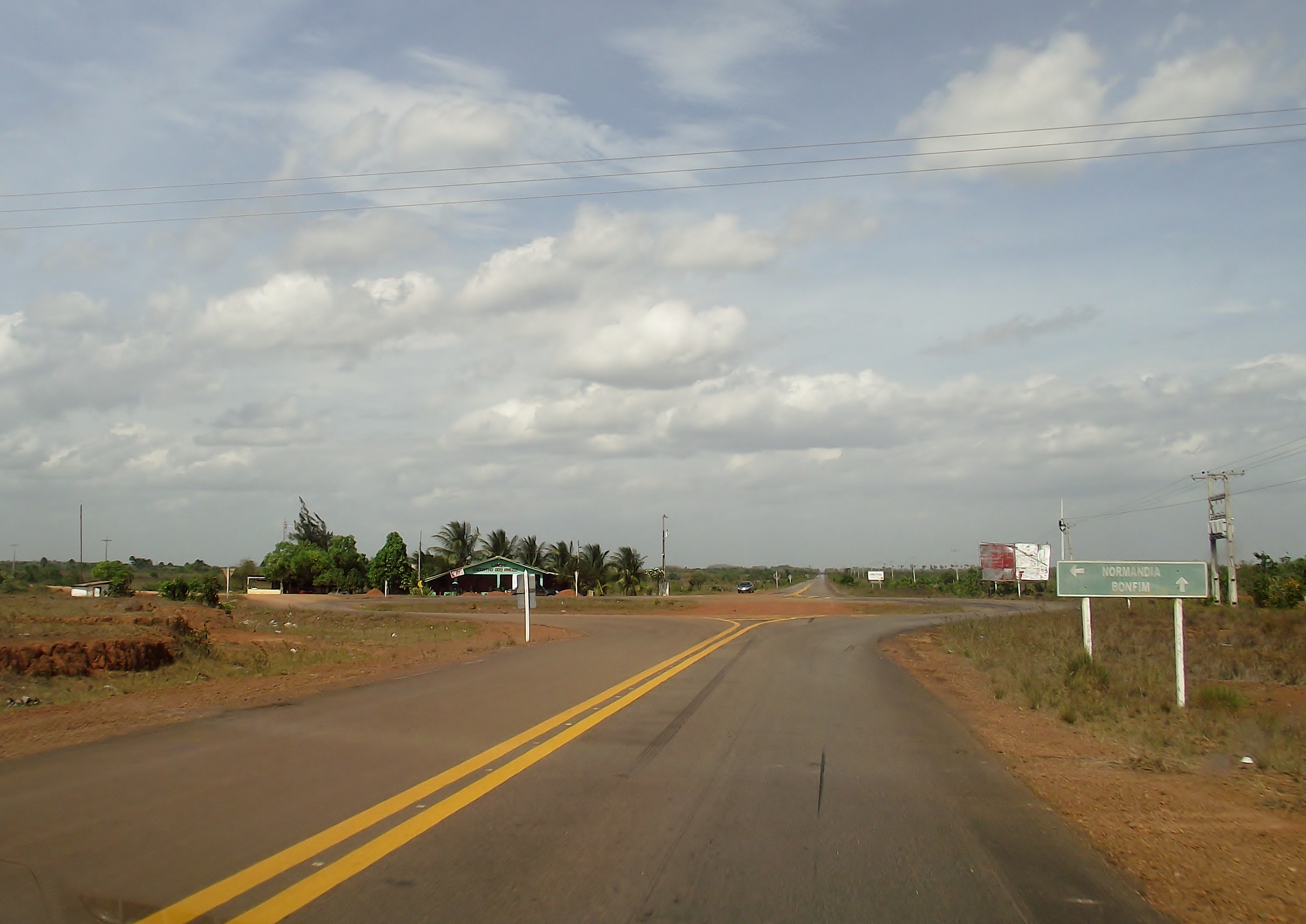 BR-401 em Bonfim, Roraima, Brasil.